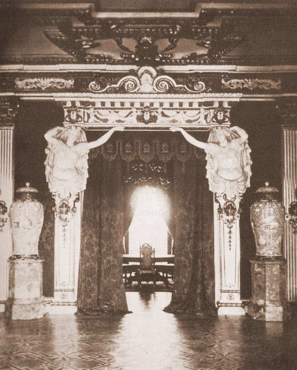 Durchgang zwischen den Festräumen im Obergeschoss